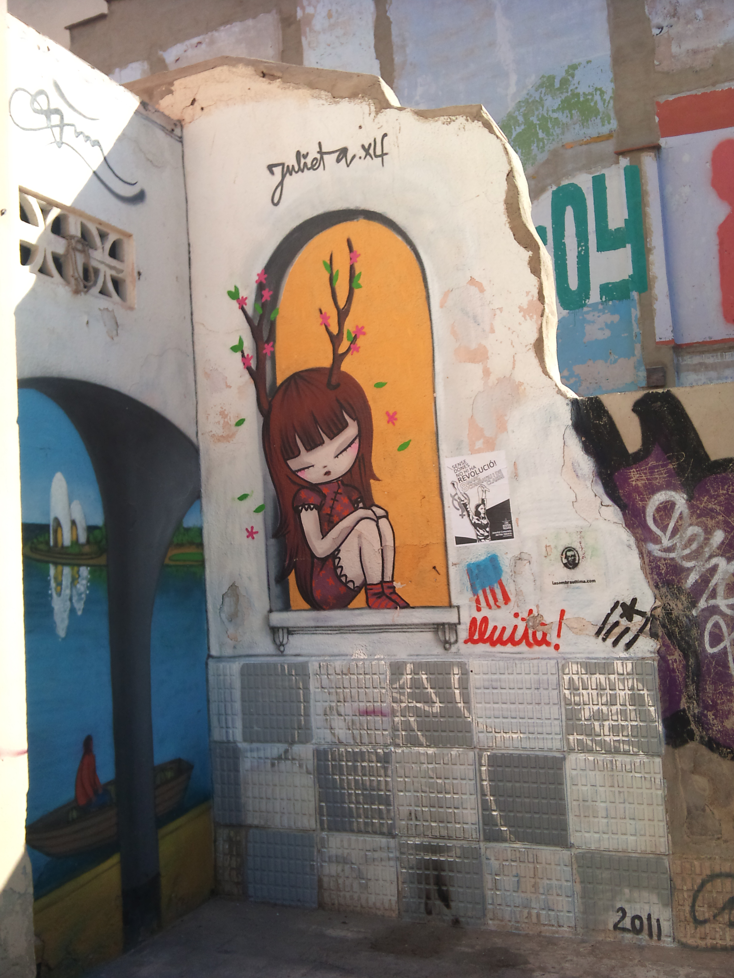 Any 2011